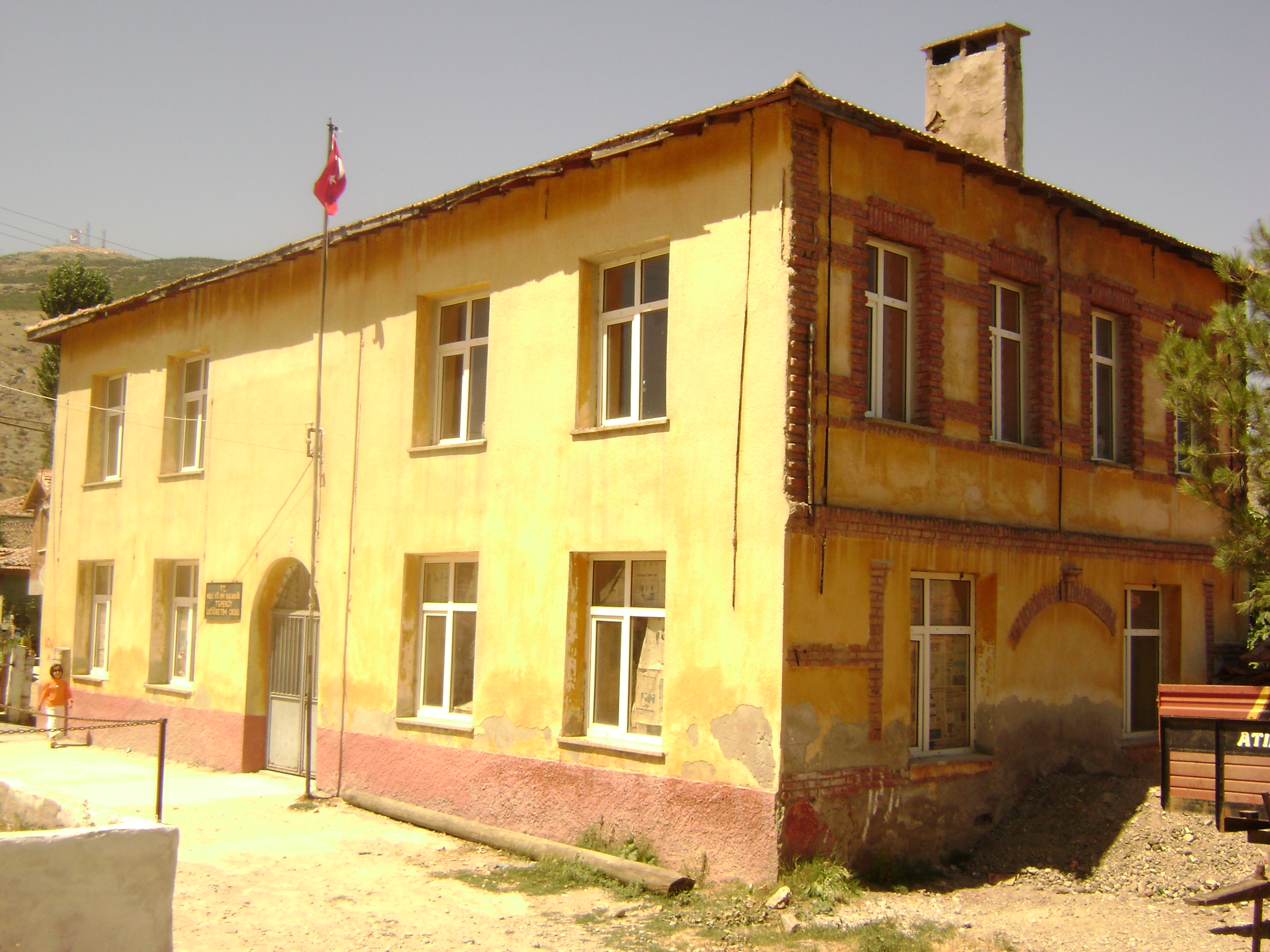 Şarköy, Tekirdağ